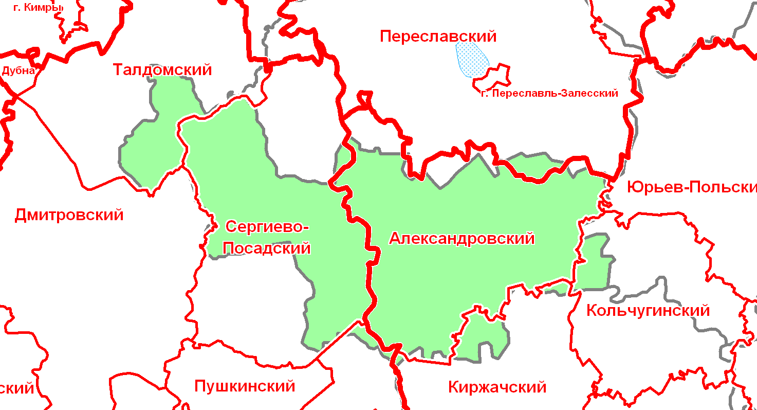 Александровский уезд в современной сетке районов.